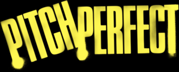 Logo original du film, The Hit Girls.